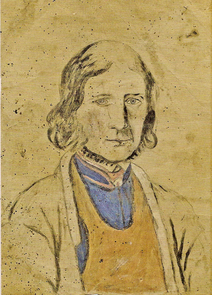 Porträtt dalmålaren. Okänd upphovsman. Privat ägo.